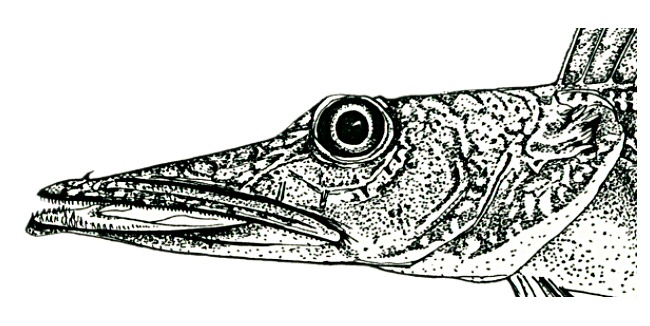 Head (drawing) of Unicorn icefish Channichthys rhinoceratus Richardson, 1844, Kerguelen Is, Antarctica